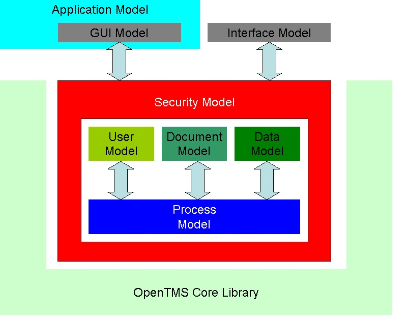 grundlegende openTMS-Softwarearchitektur